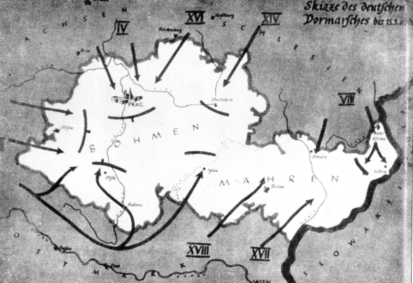 Skica německého vpádu do českých zemí 15. 3. 1939